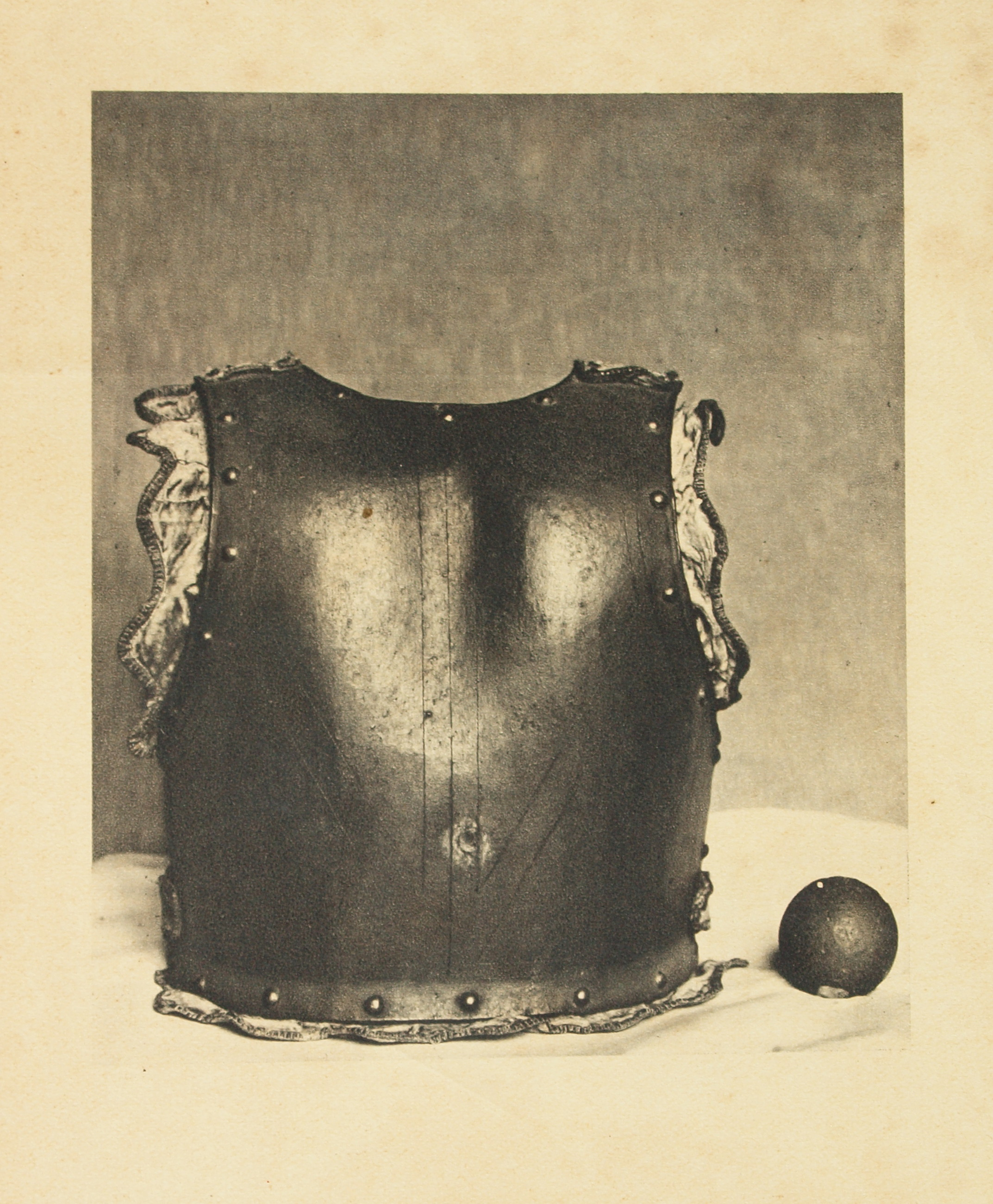 Une des 17 illustrations (y.c. les 1ere & 4e de couverture) de Turenne, soldat chrétien ,par le général Maxime Weygand.